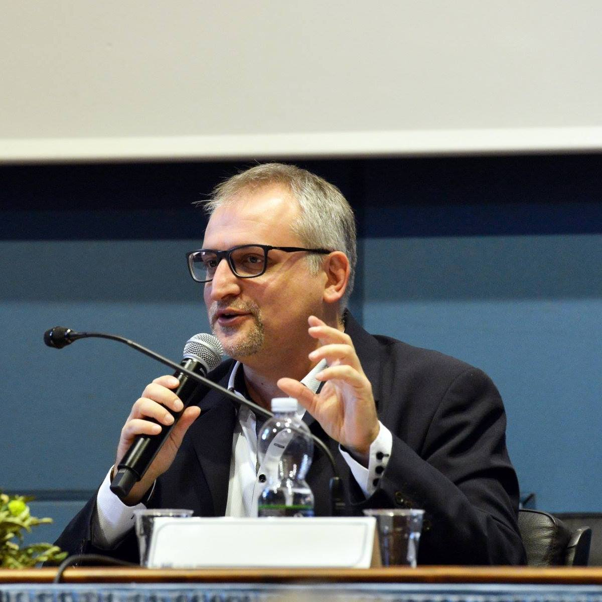 Arnaldo Casali